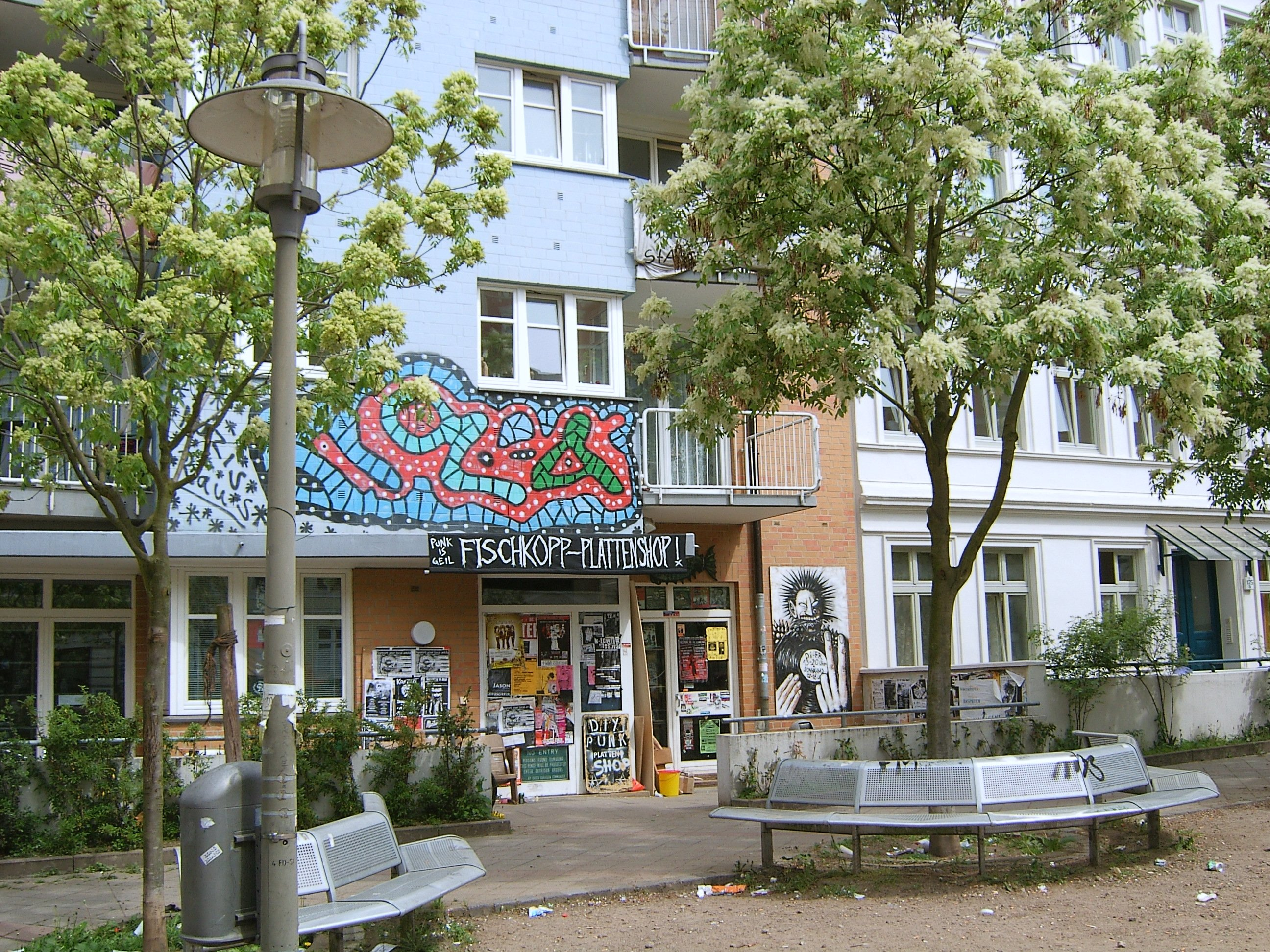 Bildbeschreibung: Hamburg, Karolinenviertel, Fotograf: selbst Datum: 15.5.2006